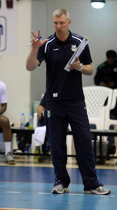 Fot. Qatar Volleyball Association